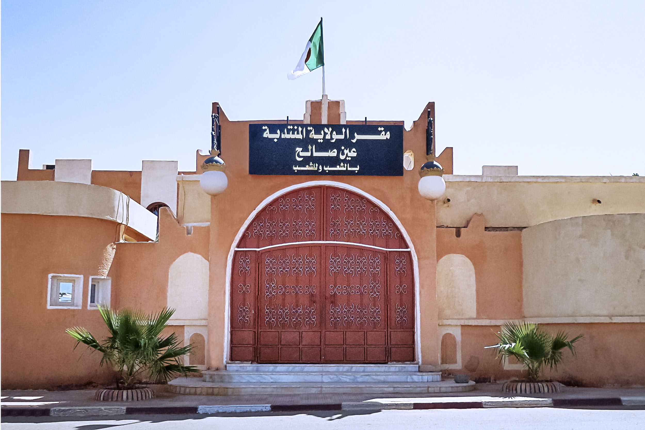 Siège de la wilaya déléguée de Ville de In Salah à Tamanrasset - Algérie مدينة عين صالح بولاية تمنراست - مقر الولاية المنتدبة - الجزائر